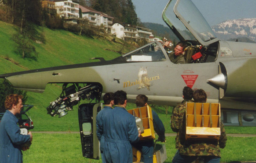 Bild zeigt den Filmwechsel bei einer Mirage 3RS (2003)